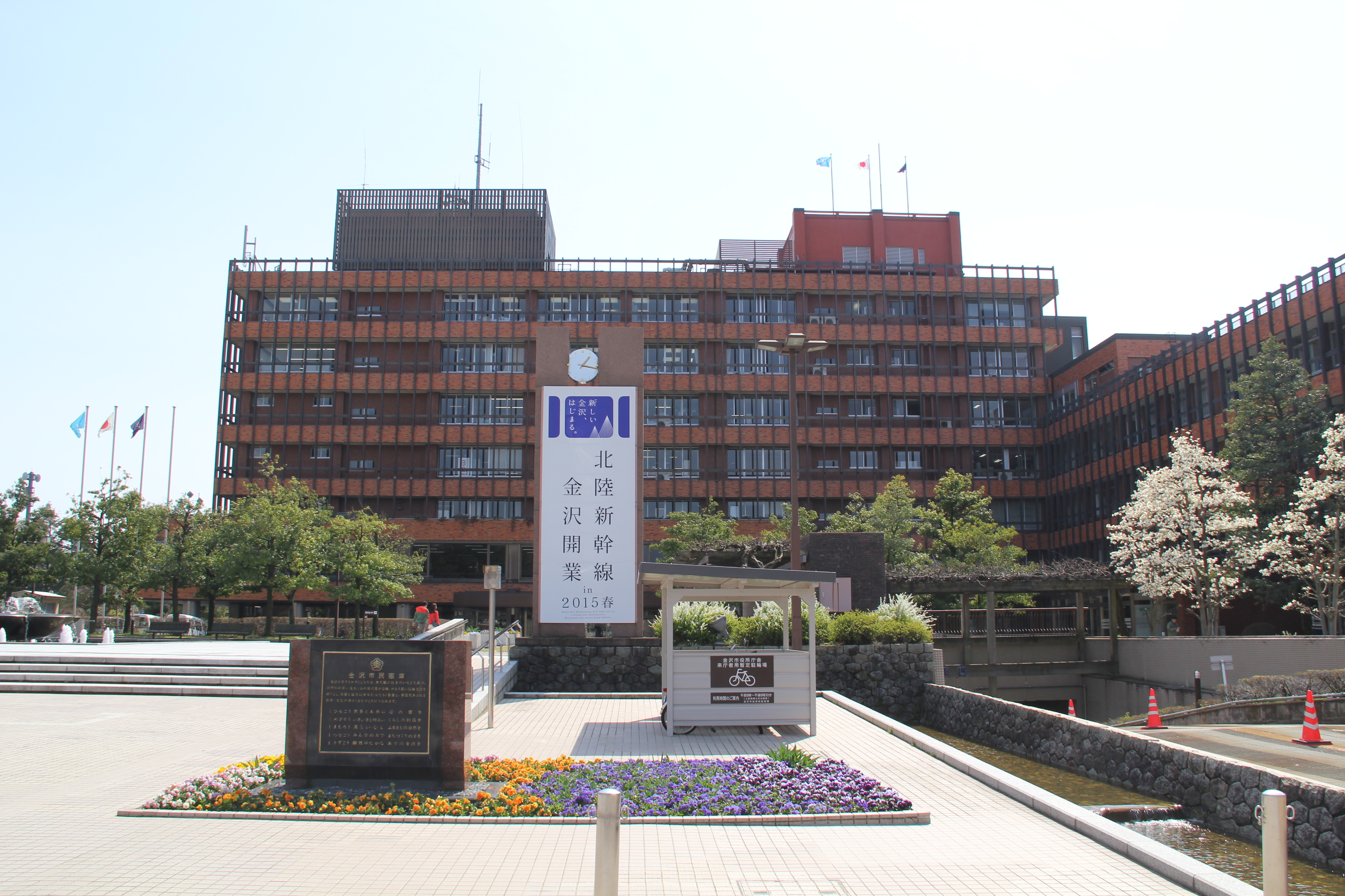 金沢市役所本庁舎